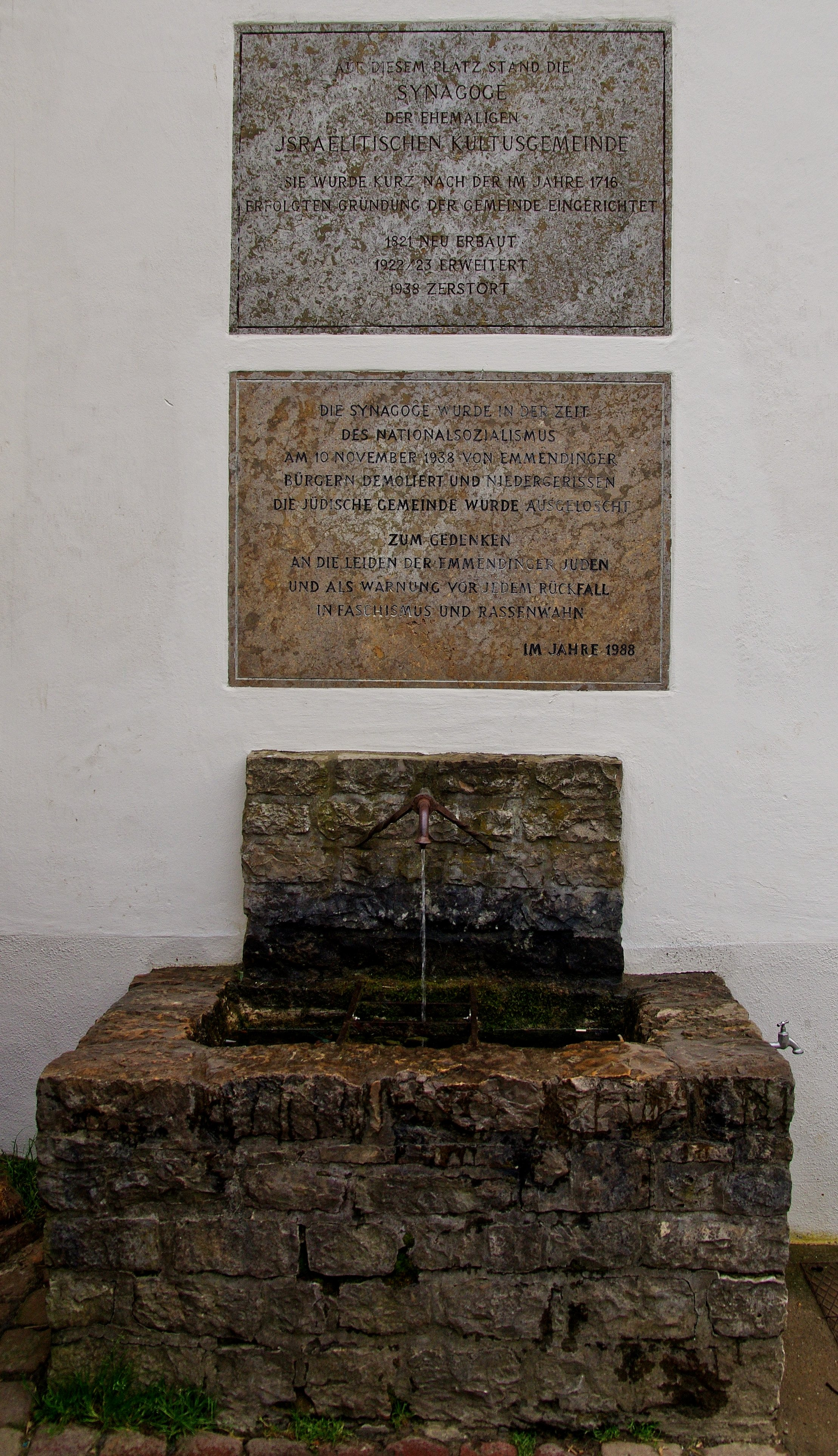 Erinnerungstafeln an die Synagoge und die Judenvertreibung in Emmendingen